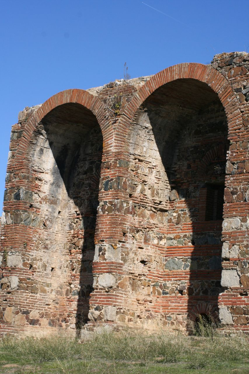 São Cucufate